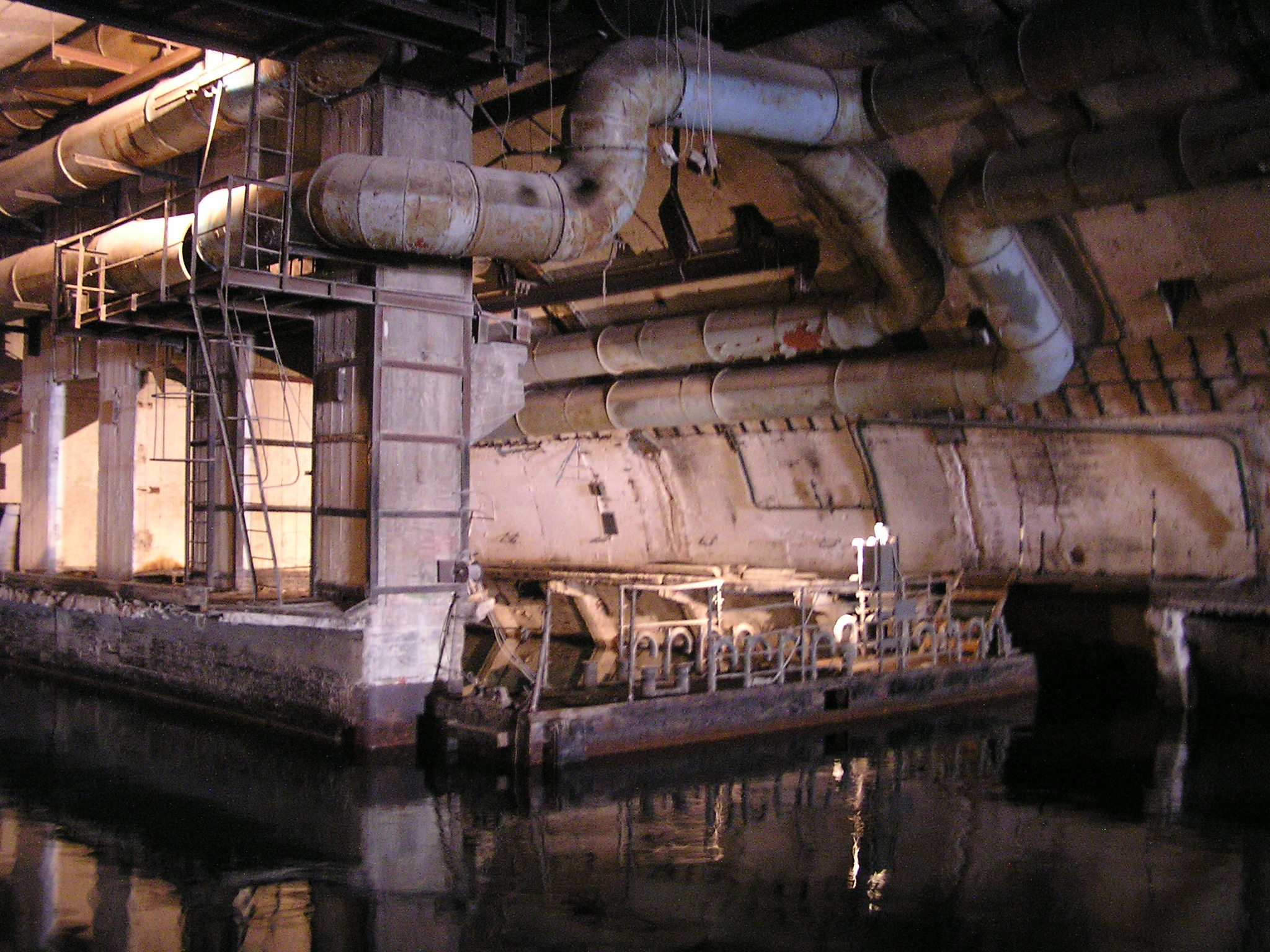 Военно-морской музей в Балаклаве